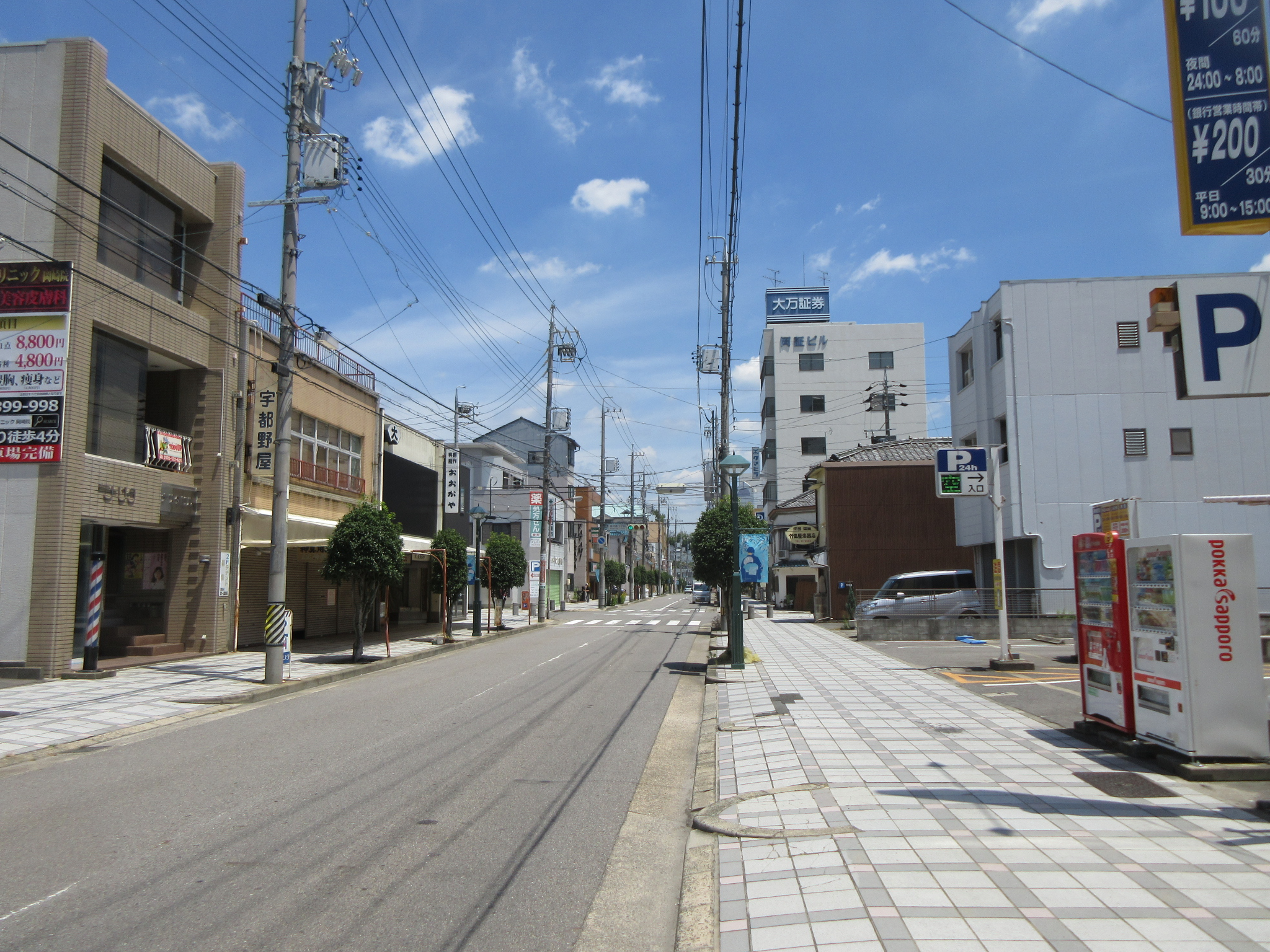 岡崎市連尺通